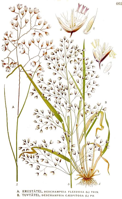 A. Avenella flexuosa (L.) Drejer, syn. Deschampsia flexuosa (L.) Trin. B. Deschampsia cespitosa (L.) P.Beauv., syn. Deschampsia caespitosa (L.) P.Beauv. Original Description A. "Kruståtel", Deschampsia flexuosa (L.) Trin. B. "Tuvtåtel", Deschampsia caespitosa (L.) Pb.